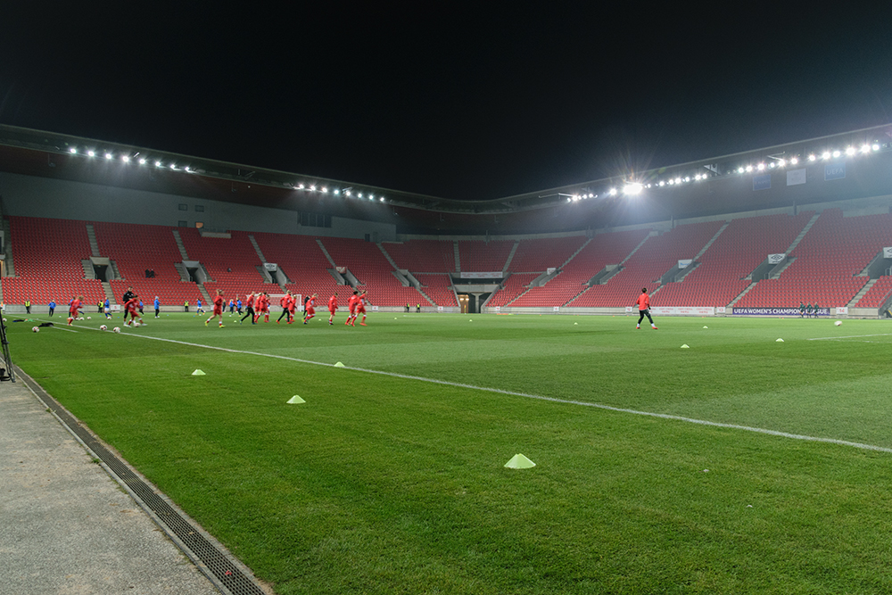 Eden Arena November 2017